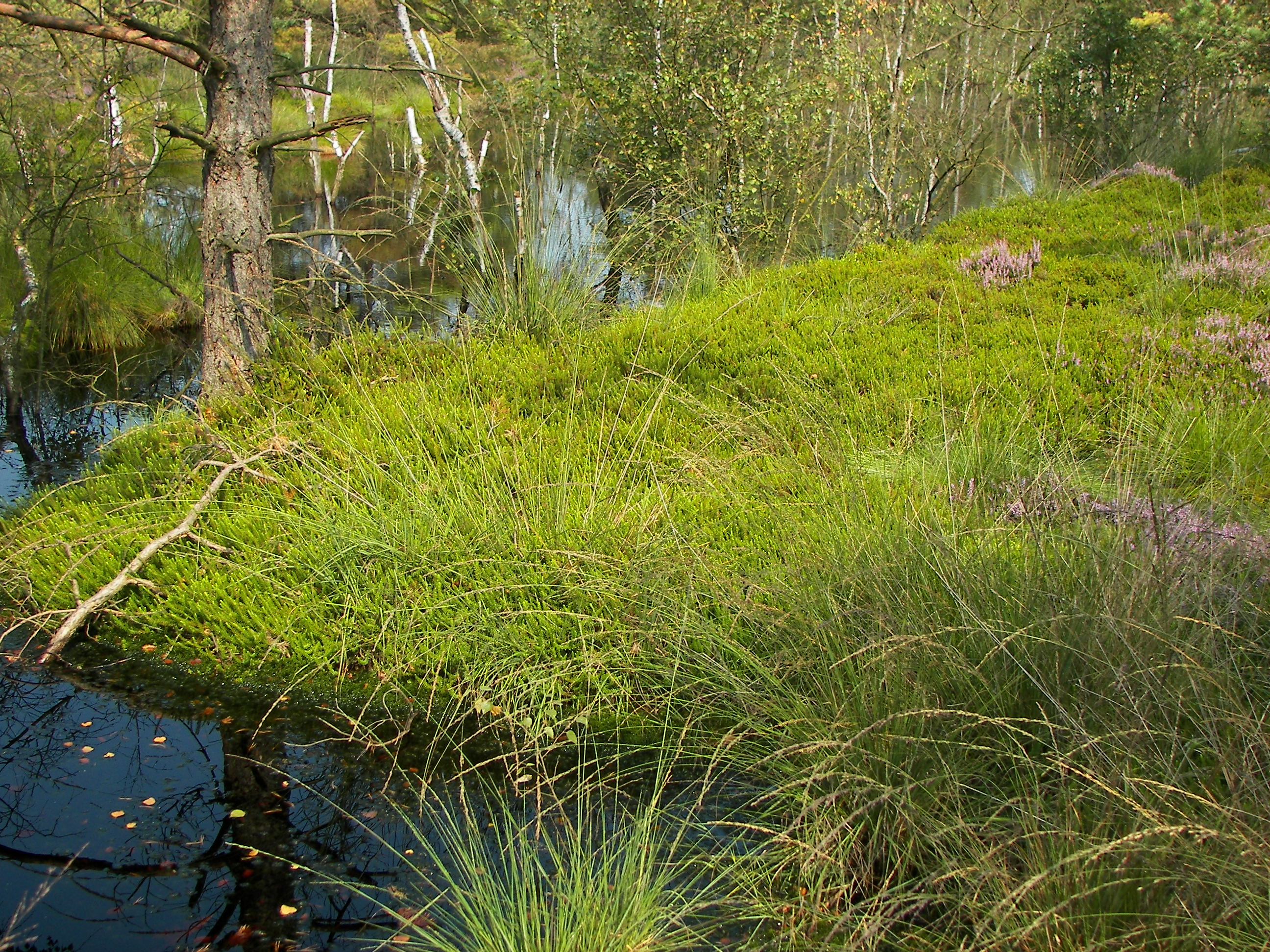 Krähenbeeren-Bestand (Empetrum nigrum) im Pietzmoor bei Schneverdingen